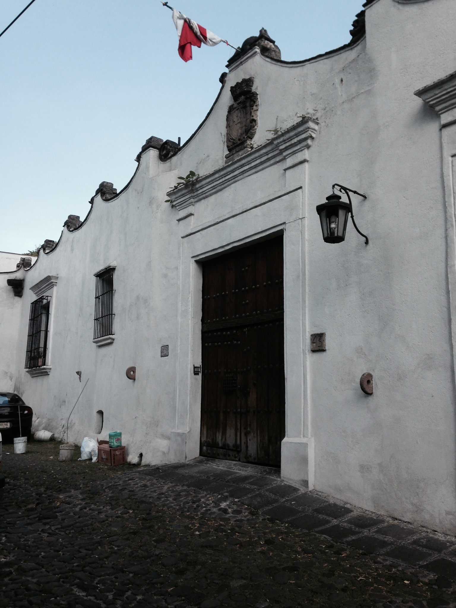 Imagen del portón principal de la Casa Blanca en San Ángel, la puerta que ahora es de madera era antes una reja, en la que de acuerdo a la historia de Doña Guiomar, ahí murió su amado. Arriba del portón se aprecia la imagen del escudo de armas y la bandera mexicana sobre el escudo. Delegación Álvaro Obregón. Distrito Federal México.